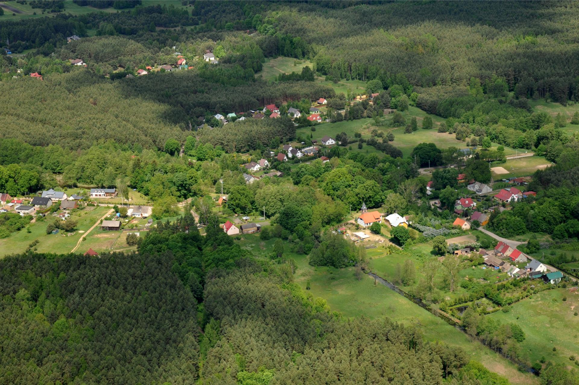 Santoczno z lotu ptaka